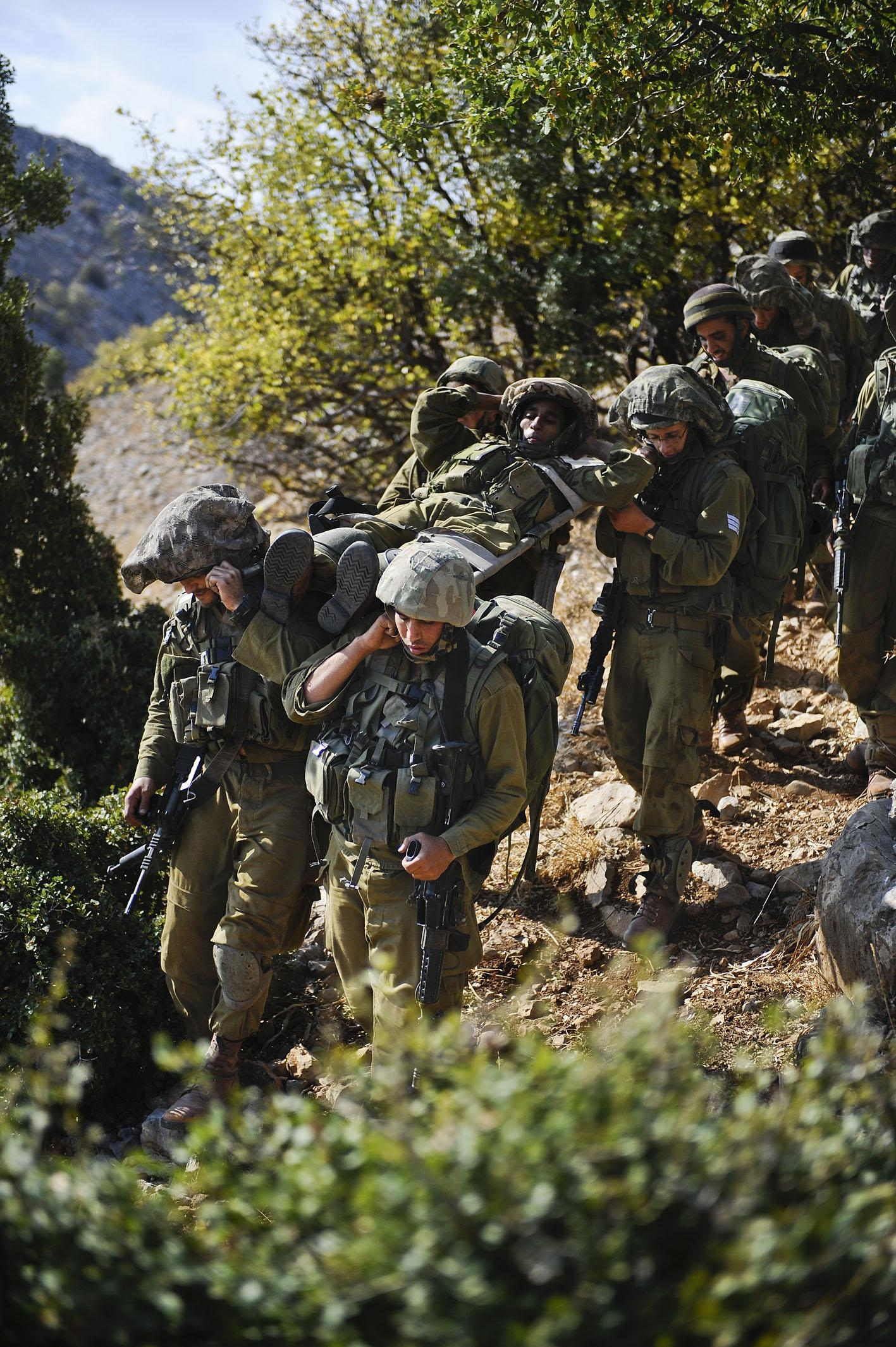 November 17, 2010. Soldiers from the Granite Battalion of the Nachal Brigade conclude a military exercise during which they practiced different scenarios, thus maintaining readiness in all fronts. היום הסתיים תרגיל של גדוד גרניט בחטיבת הנח"ל, במסגרתו אומנו הכוחות ותרגלו תרחישים שונים על מנת לשמר את מוכנותם בגזרות השונות.